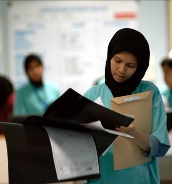 Ward Nurses working at IJN